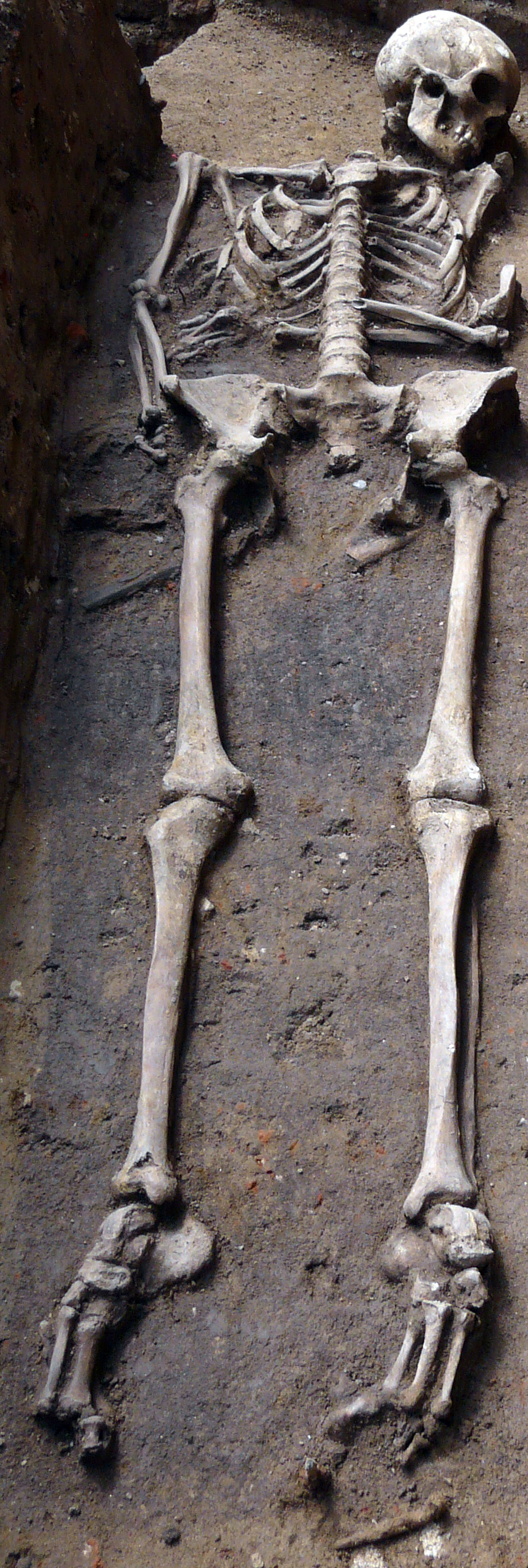 Skelett einer Grablege auf der Südseite der Evangelischen Kirche Orsoy bei den Ausgrabungen im Sommer 2010